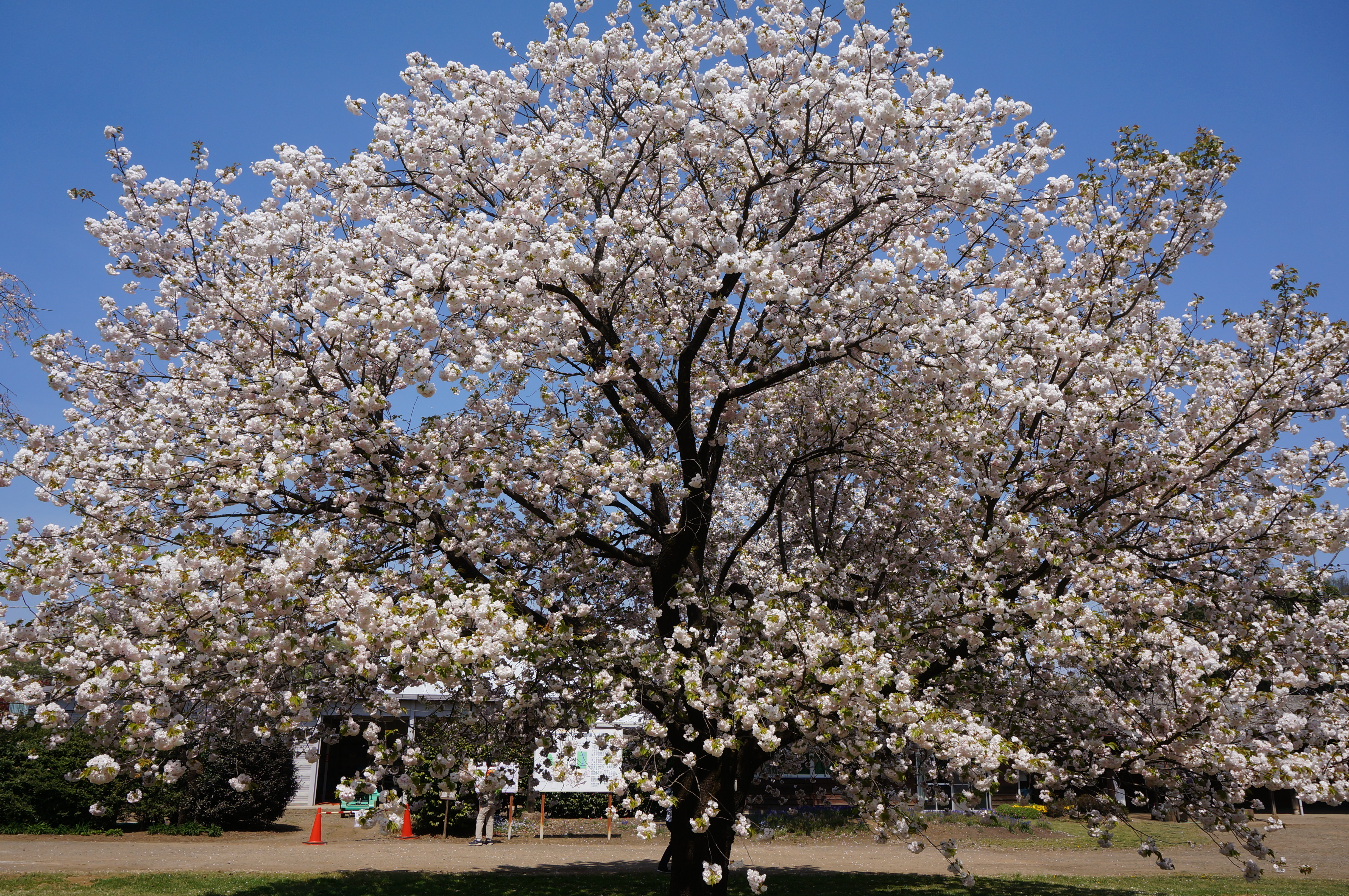 日本花の会結城農場さくら見本園にて